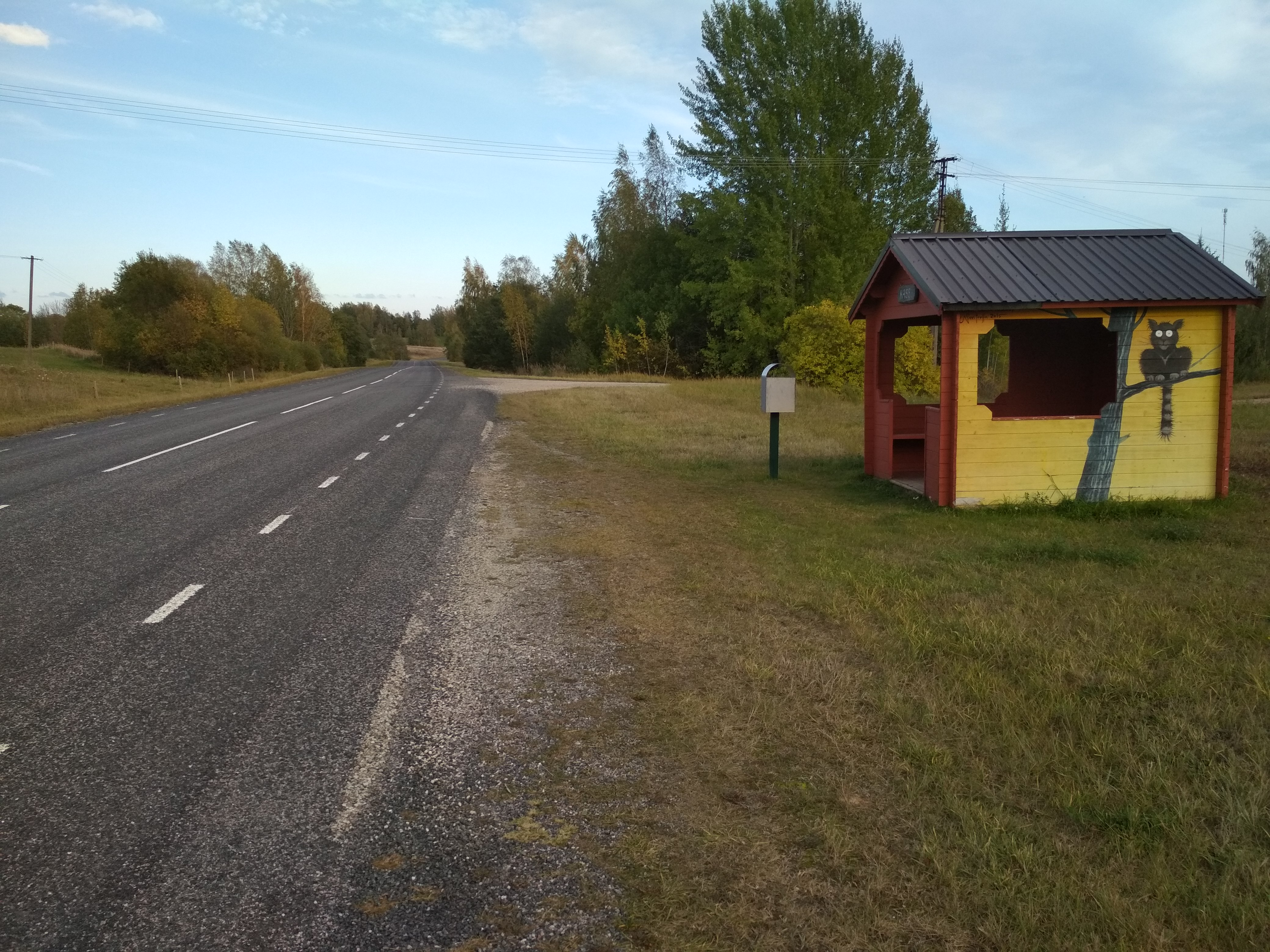 Käärikmäe küla Kassi bussipeatus Valgamaal